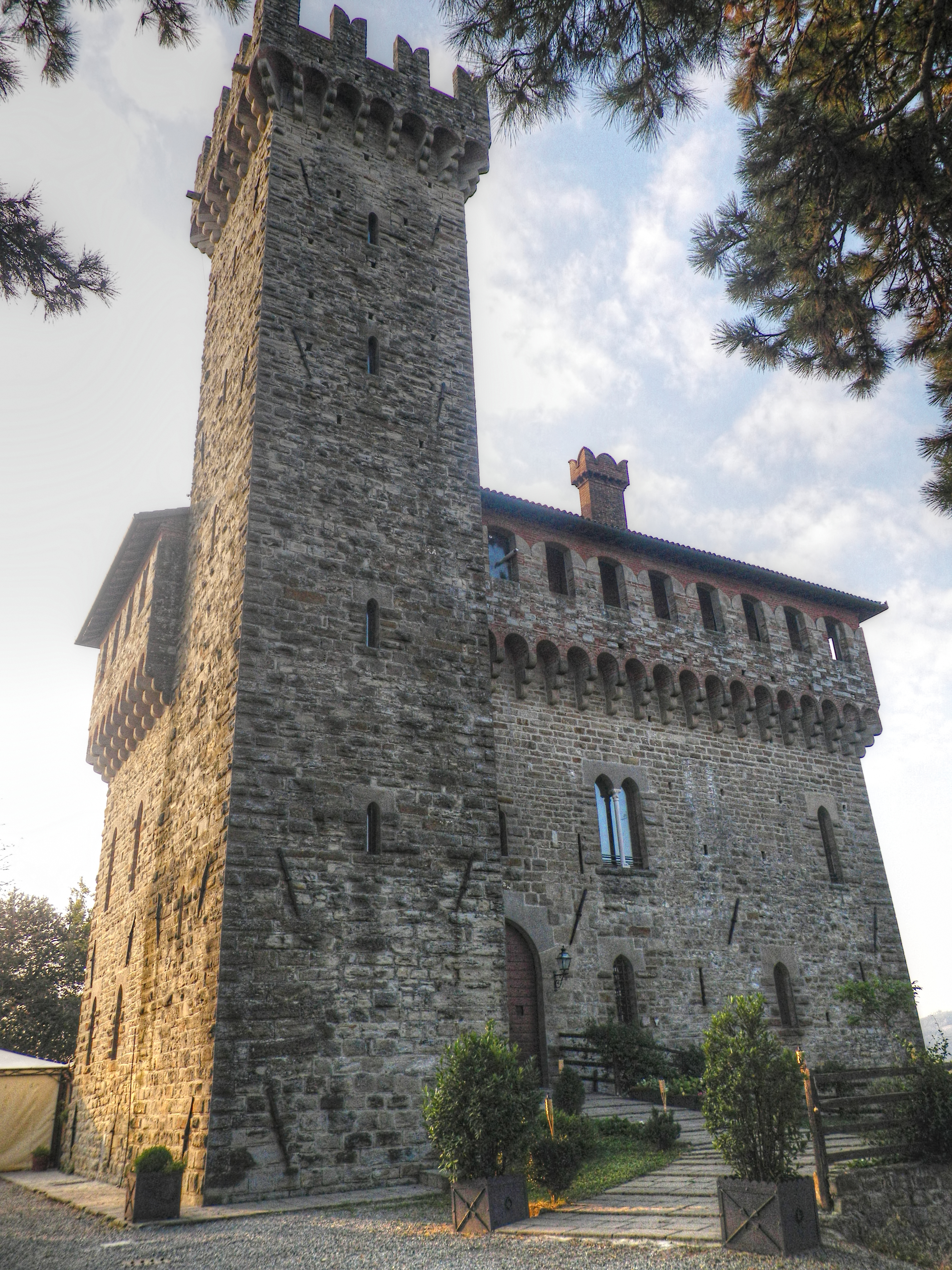 Veduta del Castello di Trisobbio